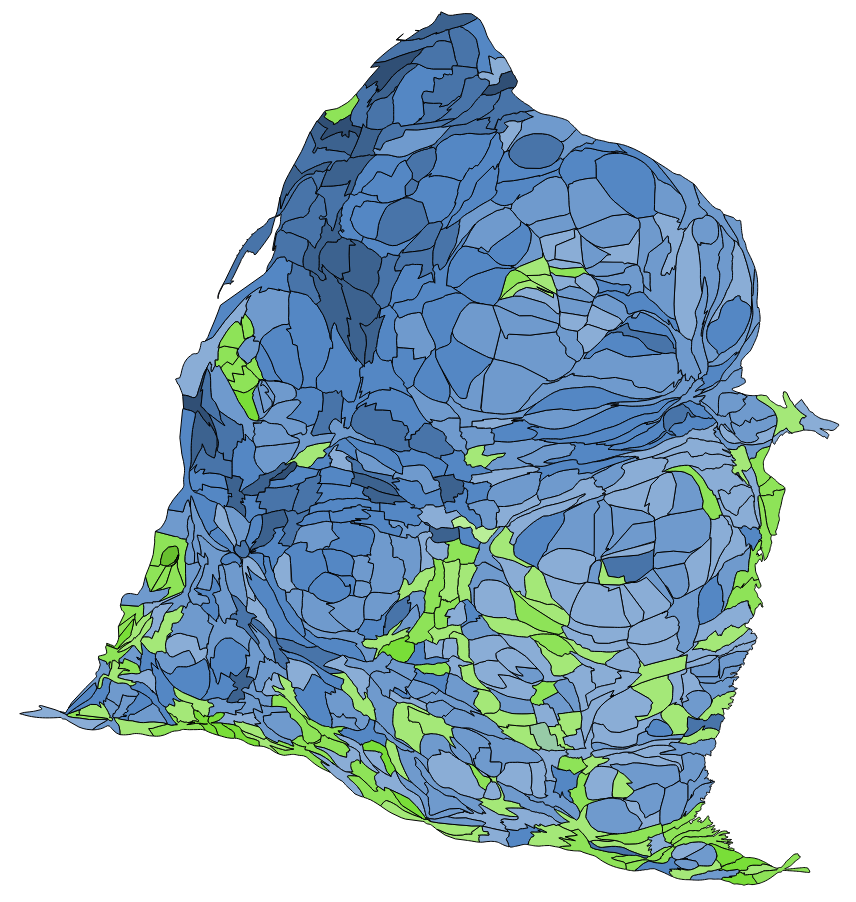 顏色對照表